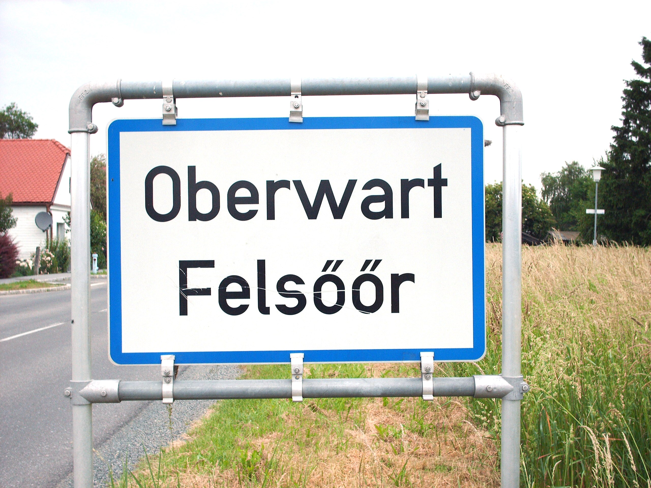 Ortsschild von Oberwart (ungarisch Felsőőr)